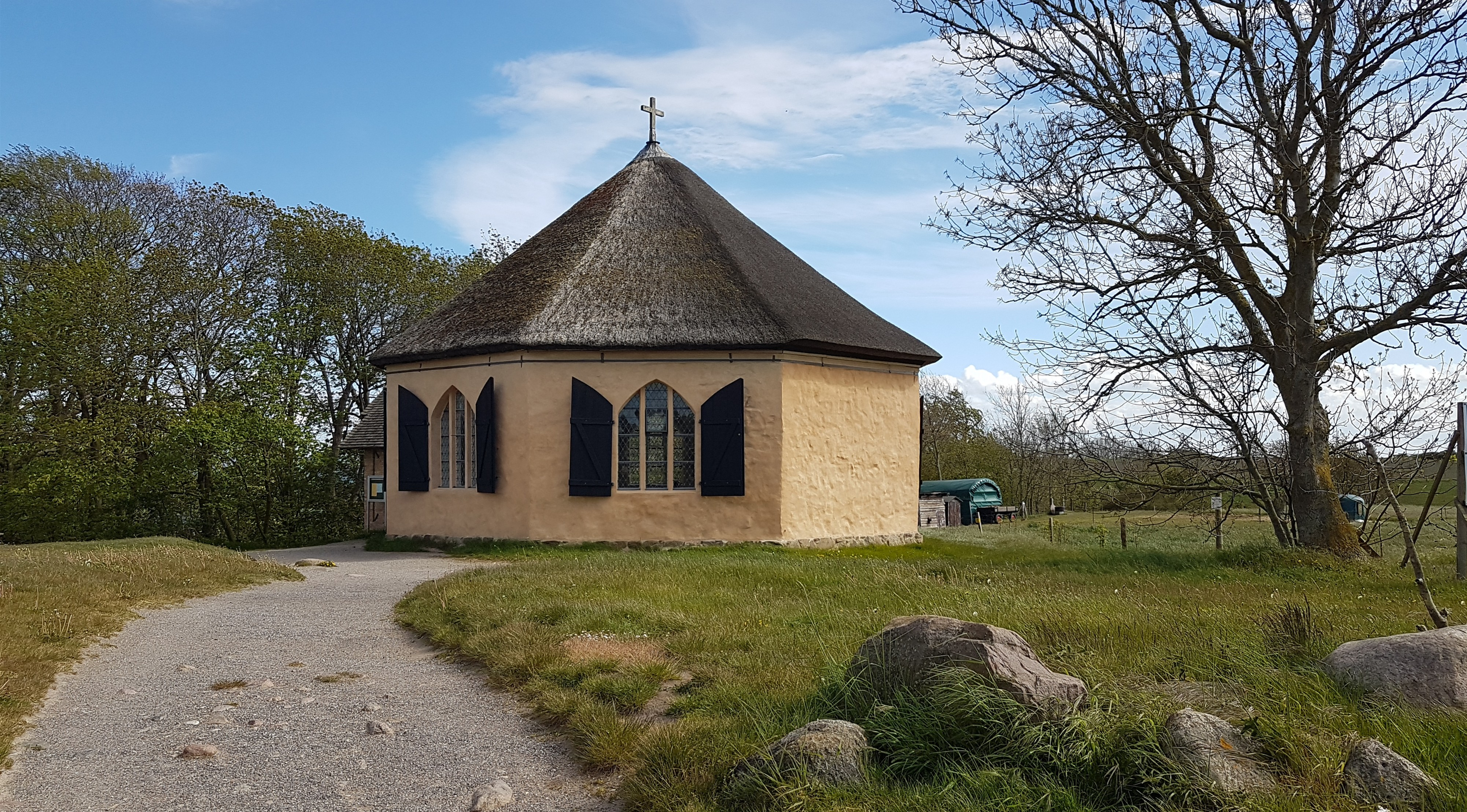 Der Kirchengemeinderat beschloss im Juli 2017, einer Empfehlung des Landesamtes für Denkmalpflege folgend, die bis dahin weiße Außenfarbe der Kapelle durch die 2017 aufgefundene originäre, terracotafarbene Farbgebung ersetzen zu lassen